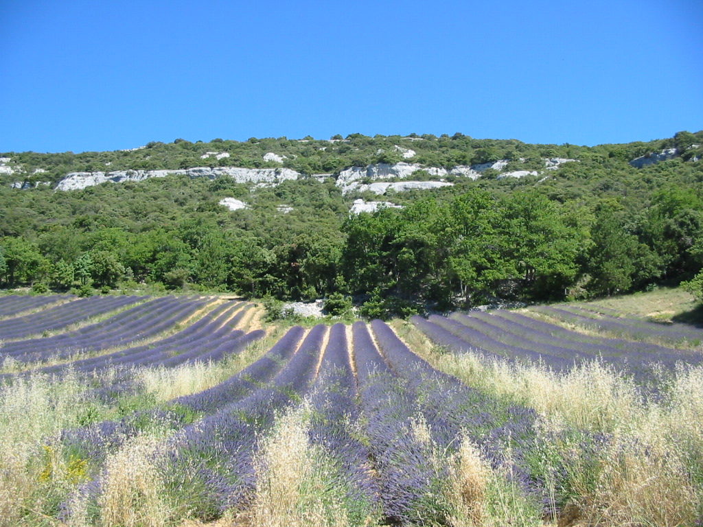 Champs de lavande à Murs